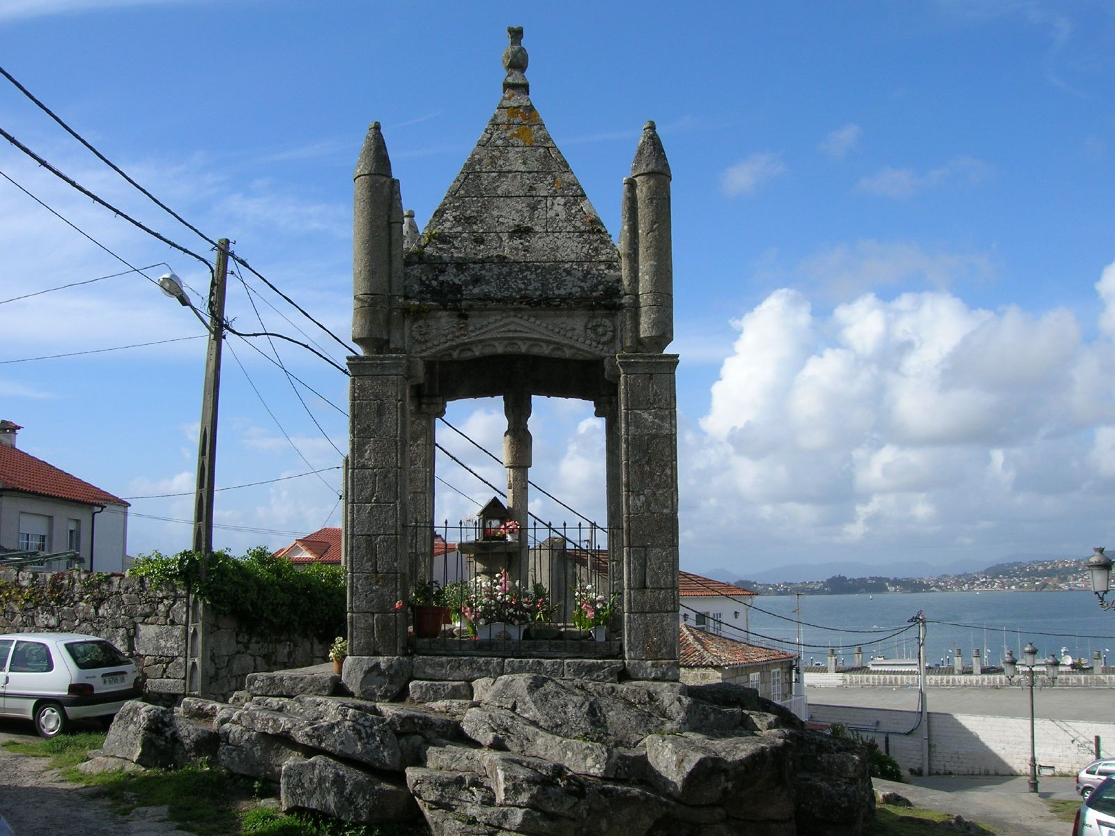 El cruceiro de la Santísima Trinidad está situado en la antigua calzada romana de la localidad de Baiona. Consta de una gran cruz gótica del siglo XV con la imagen de Cristo, cubierta por un templete de tipo renacentista apoyada sobre unas columnas finalizadas en forma de pináculos cilíndricos y remate cónico. En los pies de la cruz, nos encontramos un conjunto de 10 figuras bíblicas en piedra policromada. Antiguamente servía de altar para celebrar misa en tiempos de peste.